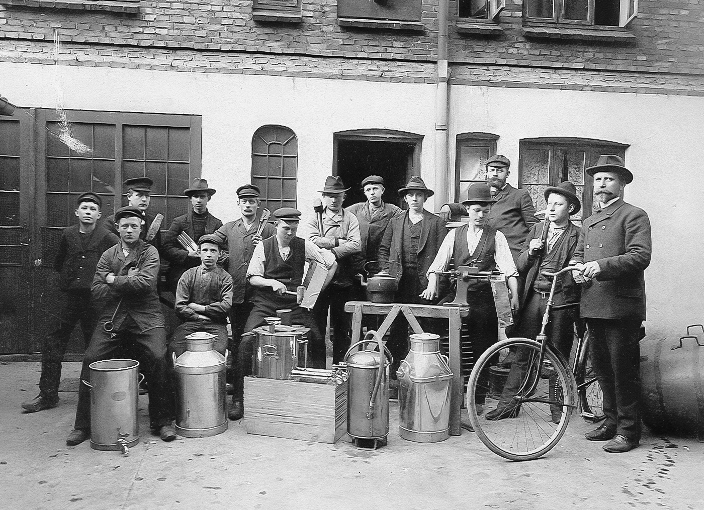 H.Chr. Hansen (med cyklen) og ansatte udenfor værkstedet i Klostergade 10.